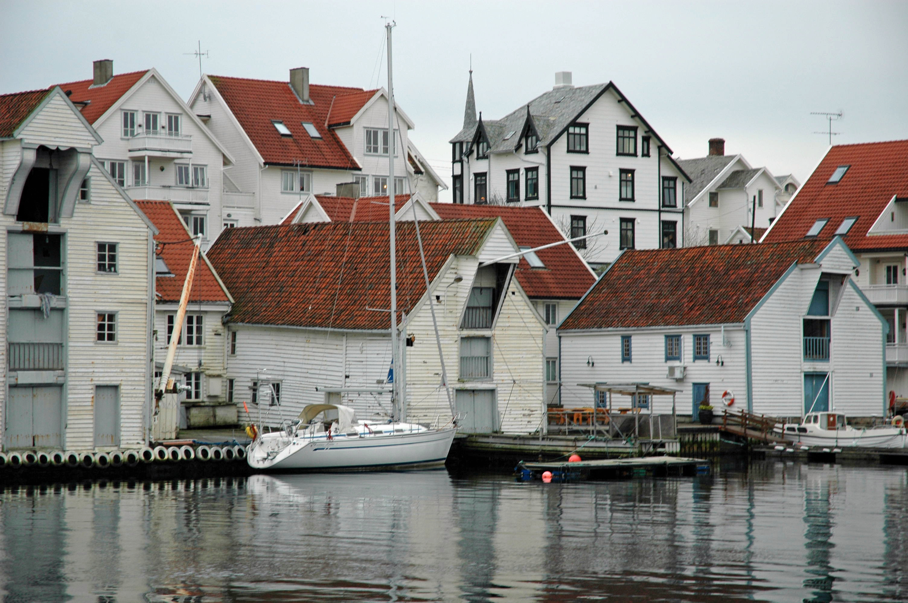 Haugesund